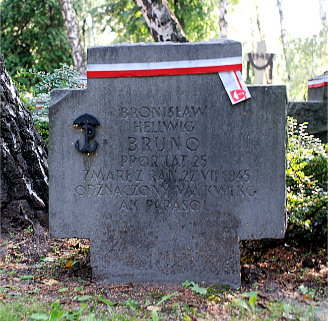 Grób Bronisława Hellwiga na Powązkach Wojskowych w Warszawie